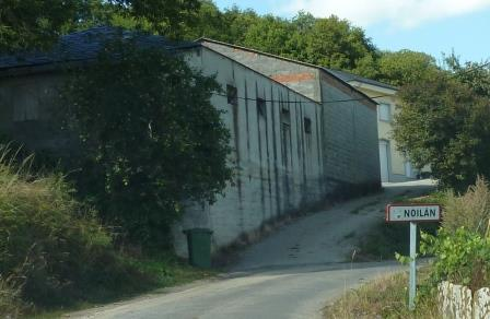 O Cotedo, parroquia da Cervela, concello do Incio, Lugo